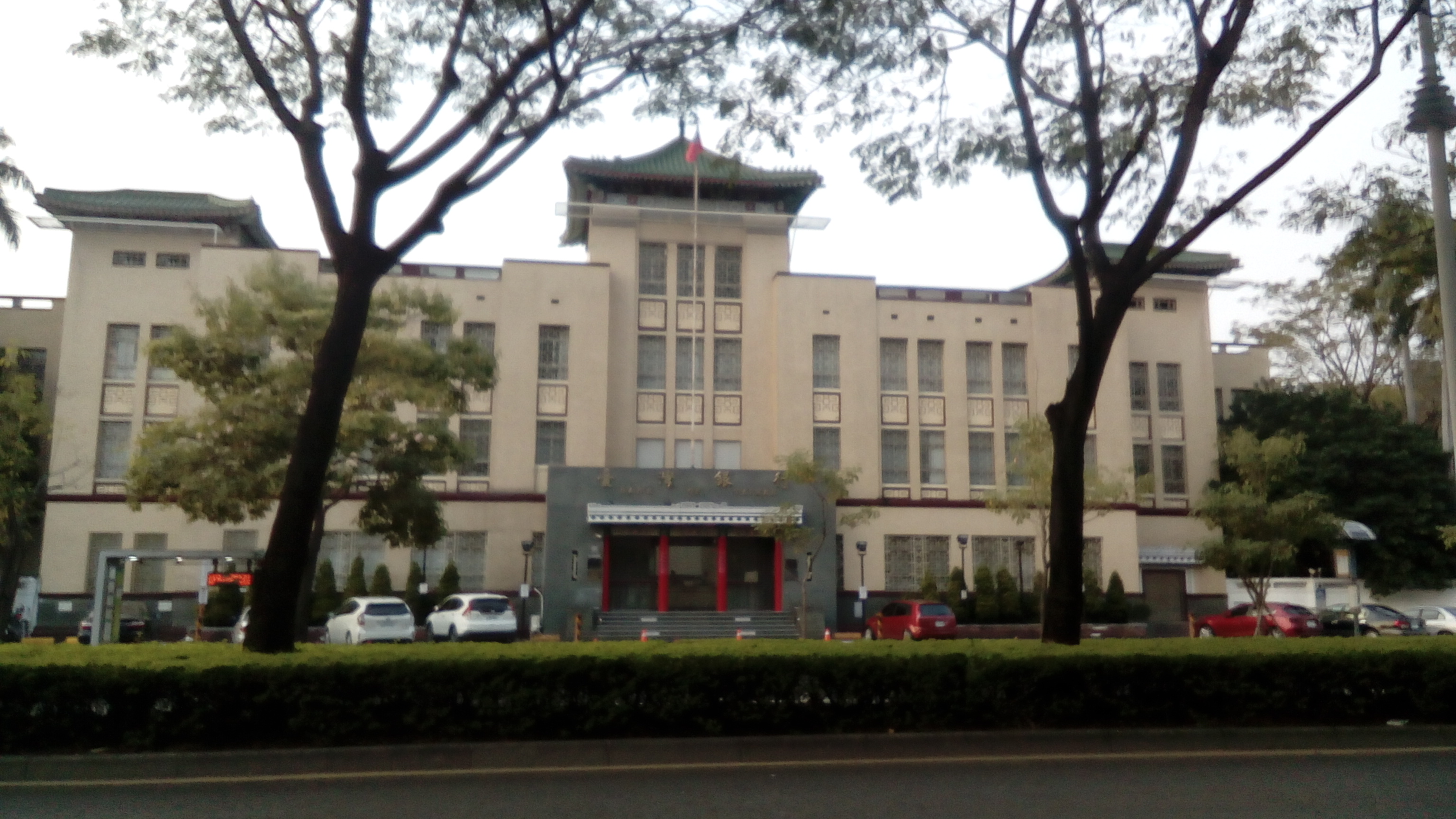 中文（台灣）: 臺灣銀行高雄分行正面。